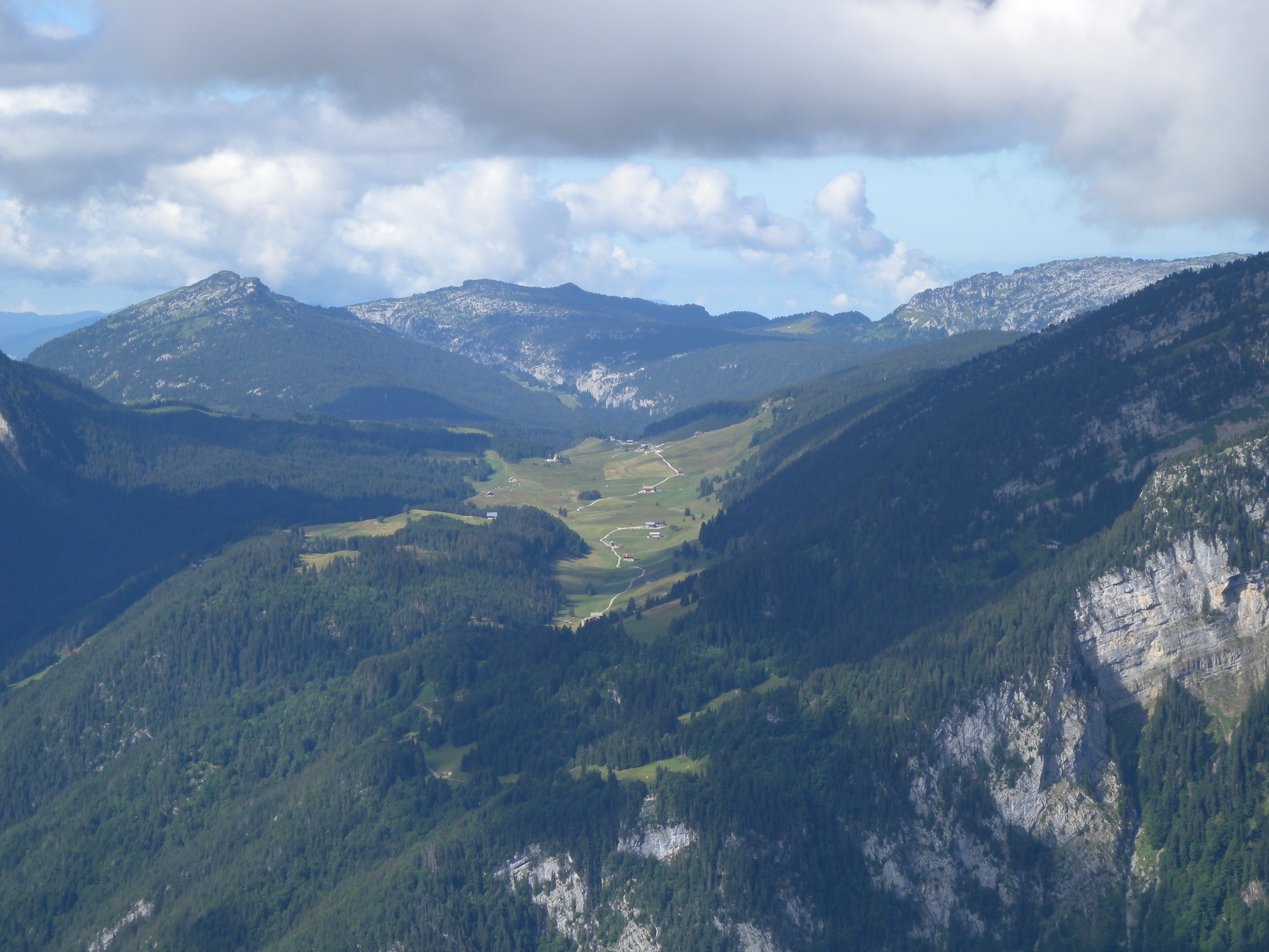 Plateau des Glieres